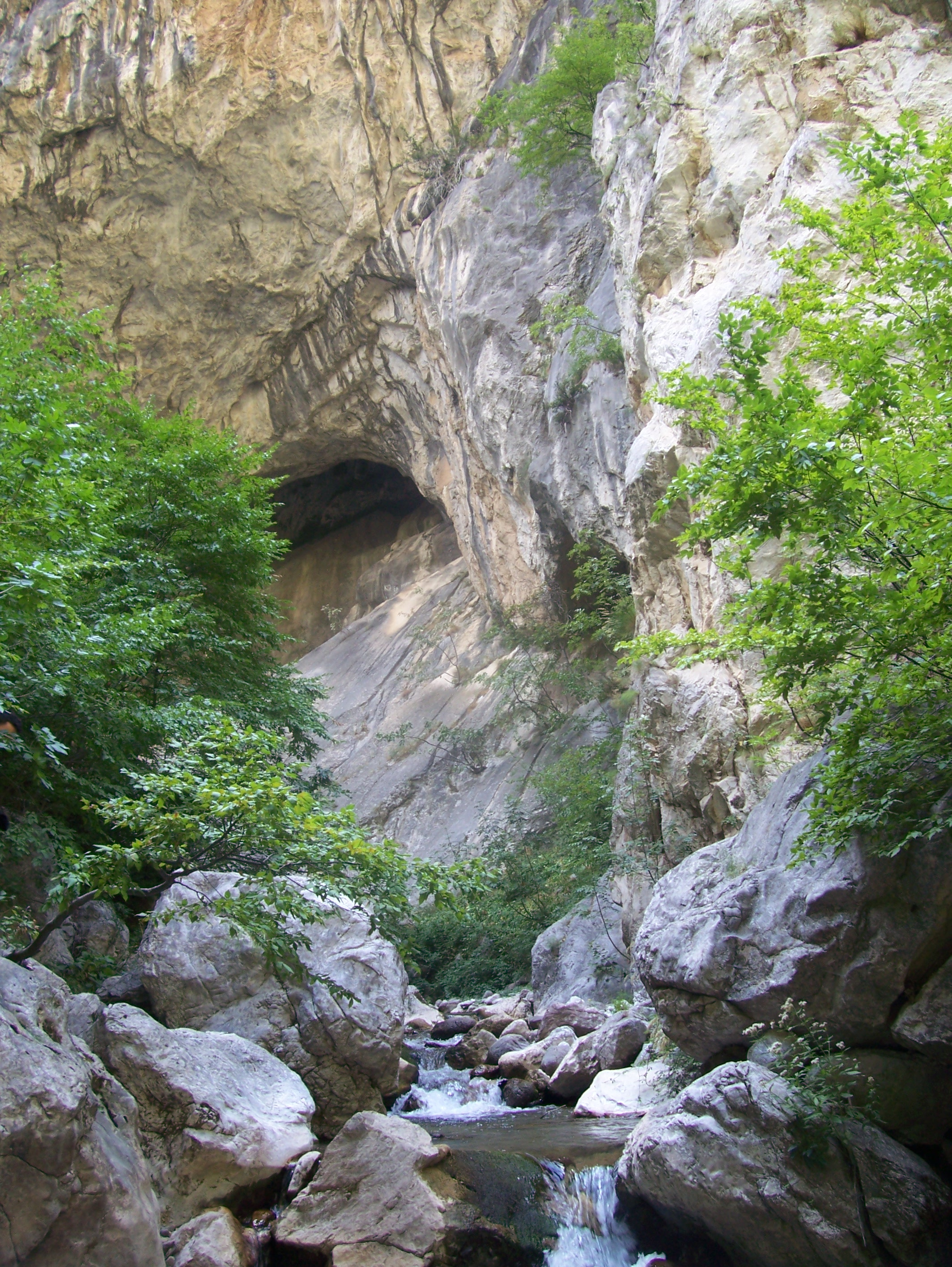 Pamje nga poshte e Kanionit te Shkalles se Keqe